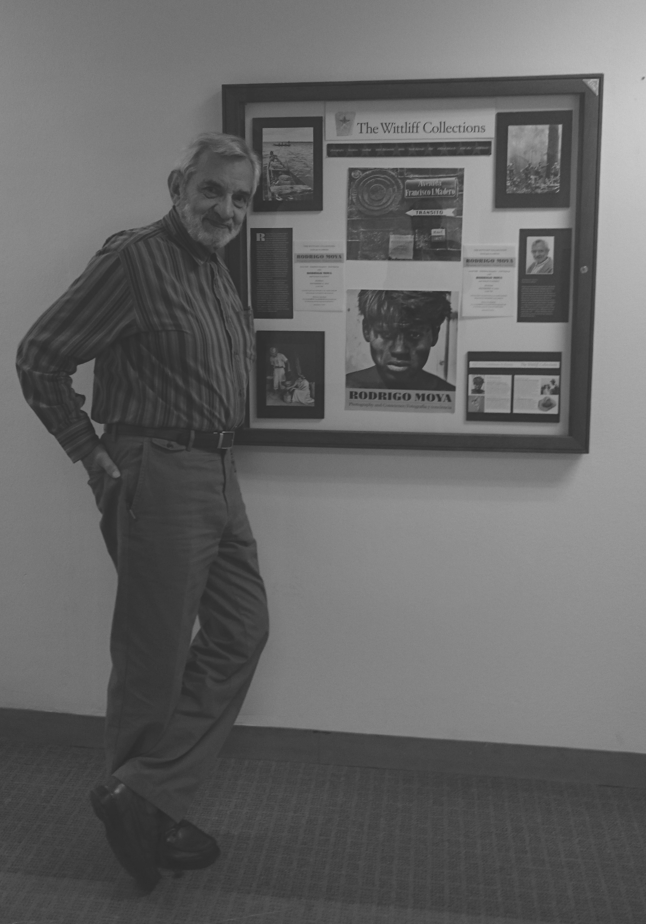 Rodrigo Moya en la exposición "Rodrigo Moya. Photography and Conscience / Fotografía y Conciencia". Wittliff Collection en la Texas State University. San Marcos, Texas, 14 de noviembre de 2015.